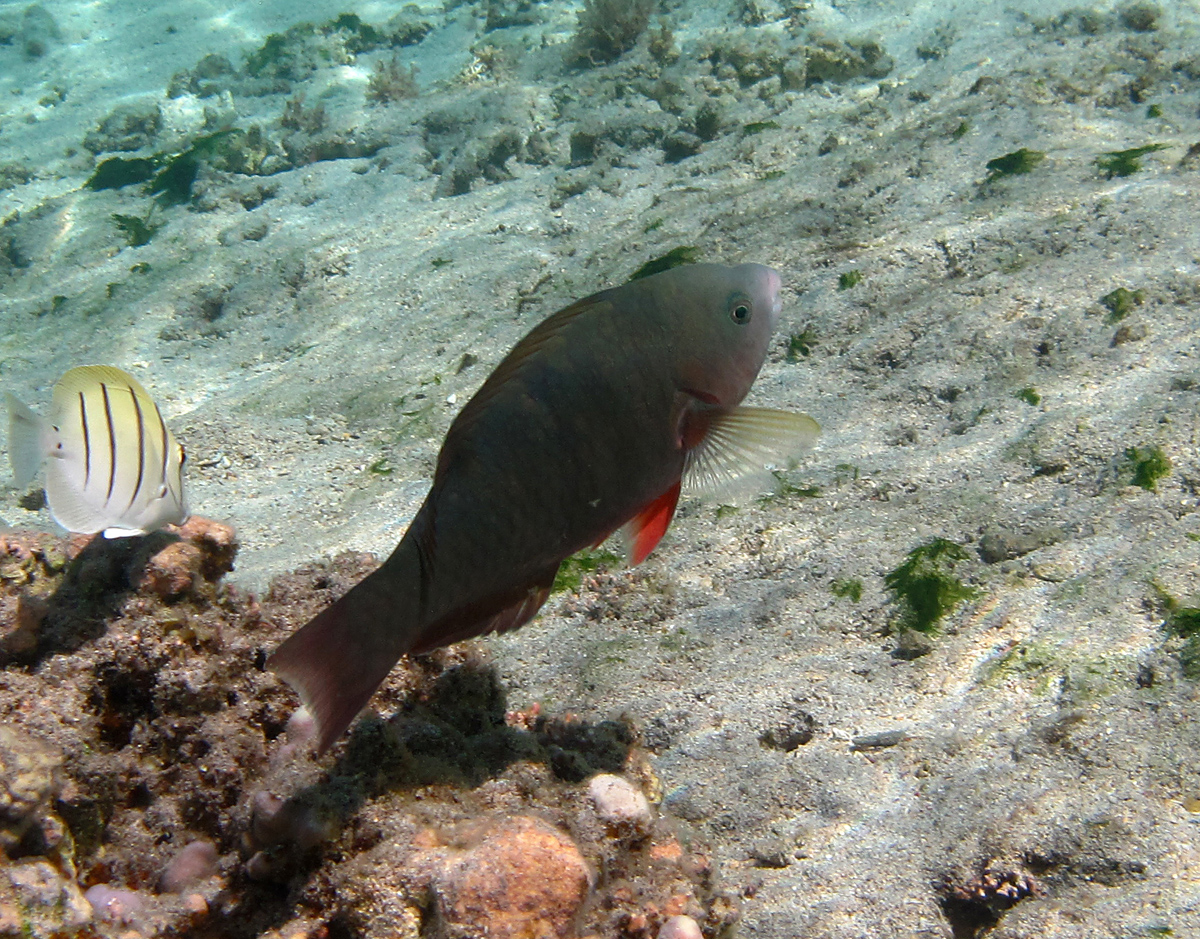 Un poisson-perroquet commun (Scarus psittacus) en phase initiale à la Réunion.